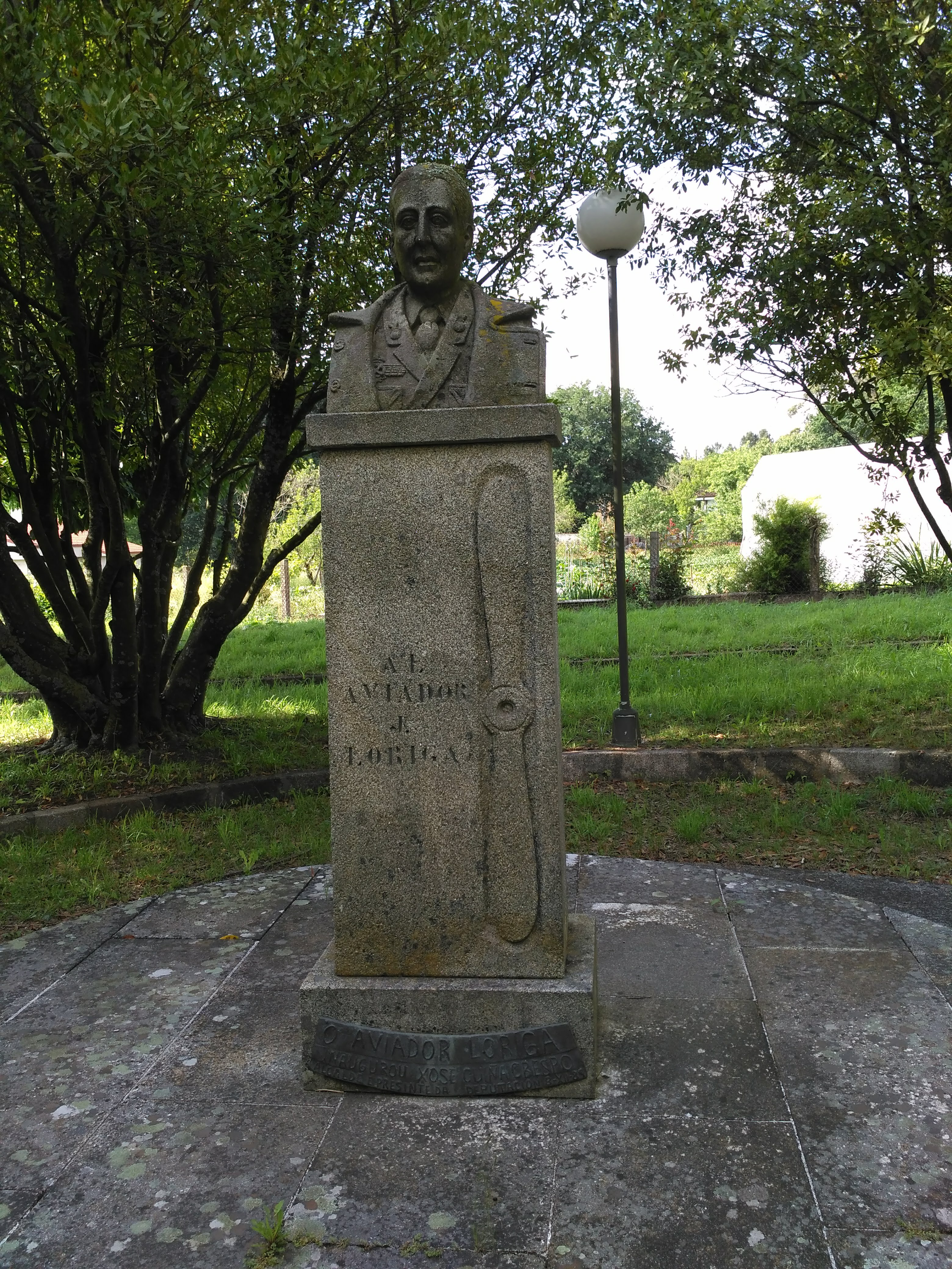 Estatua de Joaquín Loriga